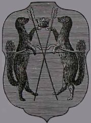 Рисунок герба Сибирского царства